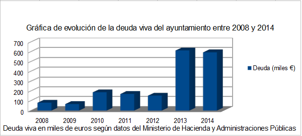 Evolución de la deuda viva de Moros entre 2008 y 2014